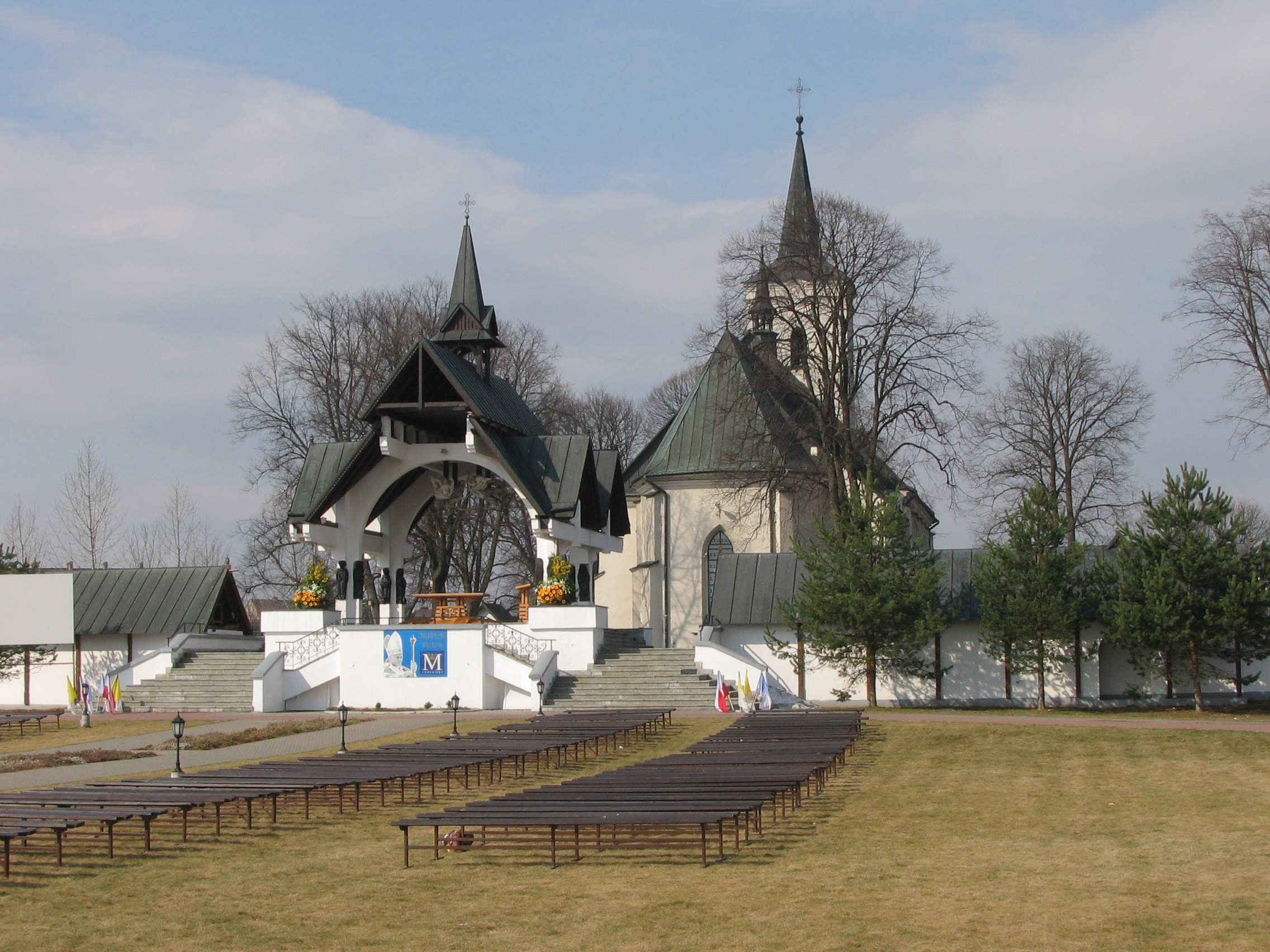 Ludźmierz - kościół i ołtarz polowy